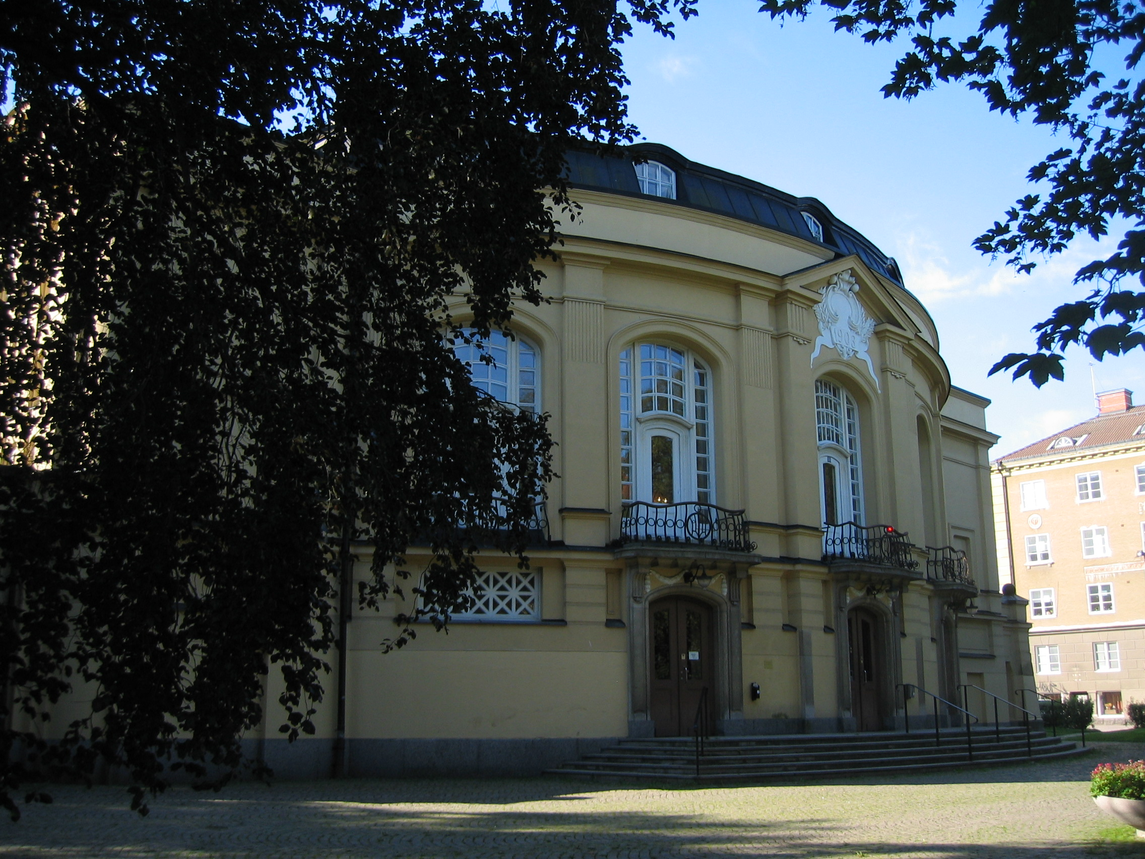 Linköpings teater, en del av Östgötateatern.